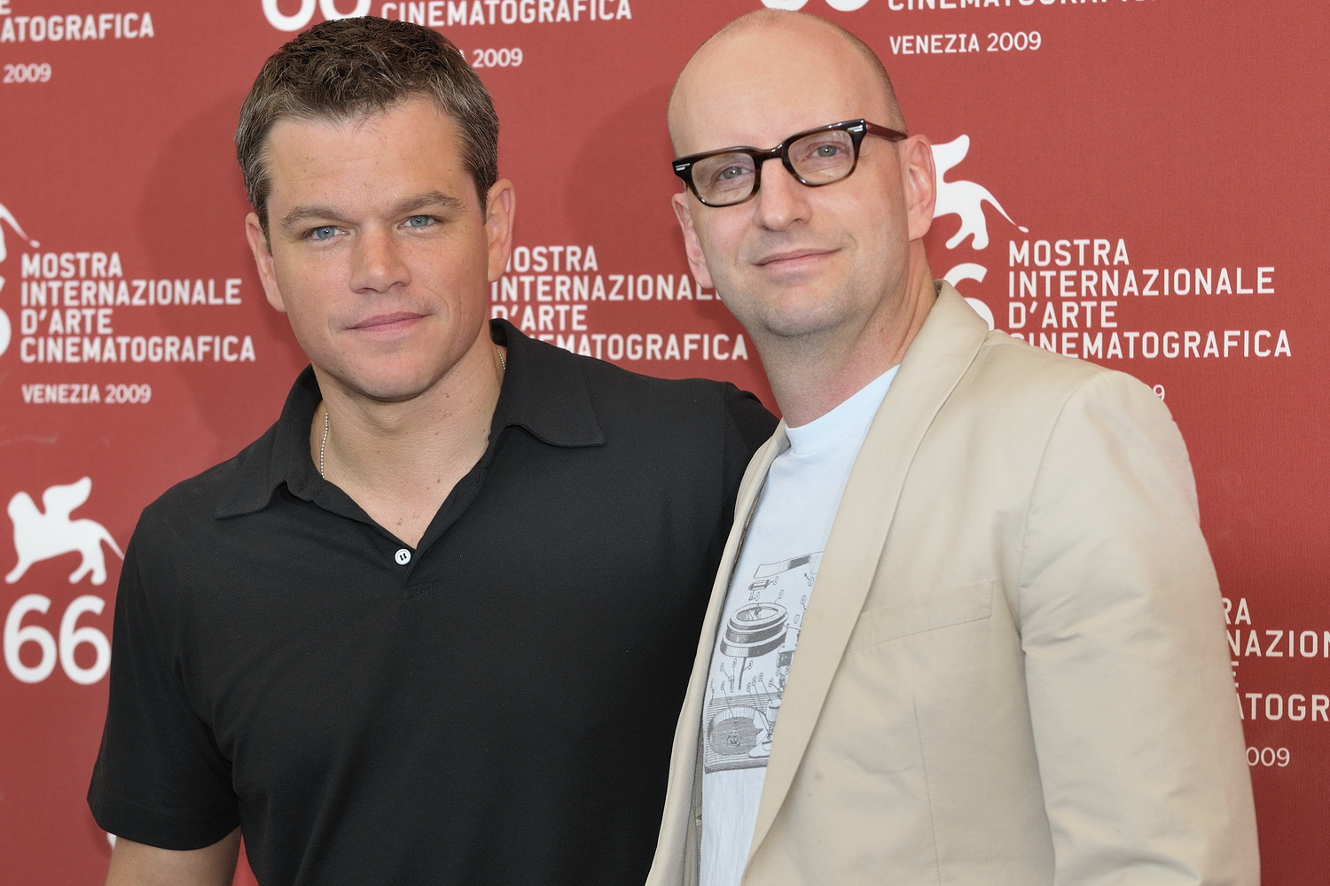 66ème Festival du Cinéma de Venise (Mostra), 6ème jour (07/09/2009) Photocall avec Matt Damon et Steven Soderbergh pour le film : The Informant